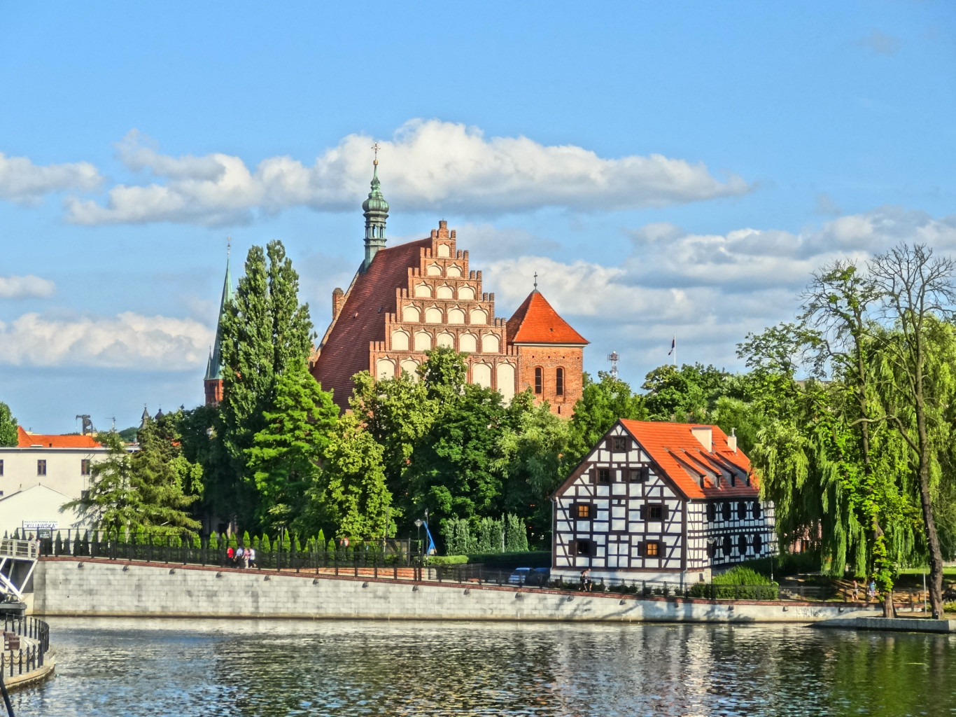 Katedra p.w. św. Marcina i Mikołaja w Bydgoszczy (XV w.) oraz Biały Spichlerz (XVIII w.) - widok z grobli na Wyspie Młyńskiej